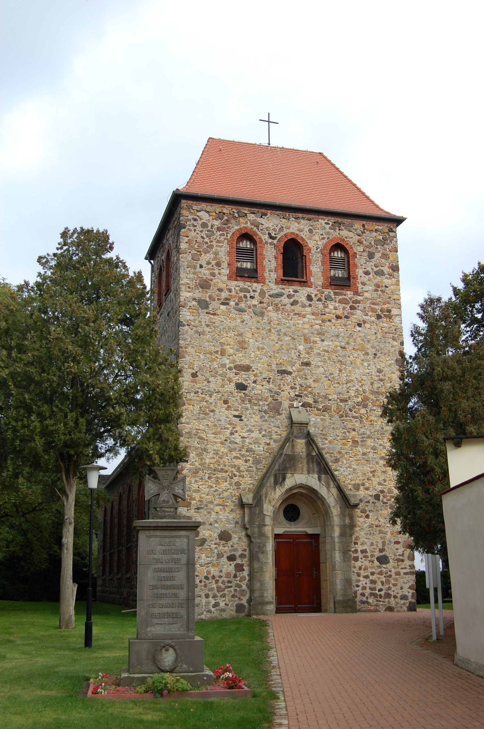 Turm der Sankt-Benedikt-Kirche in Güterglück